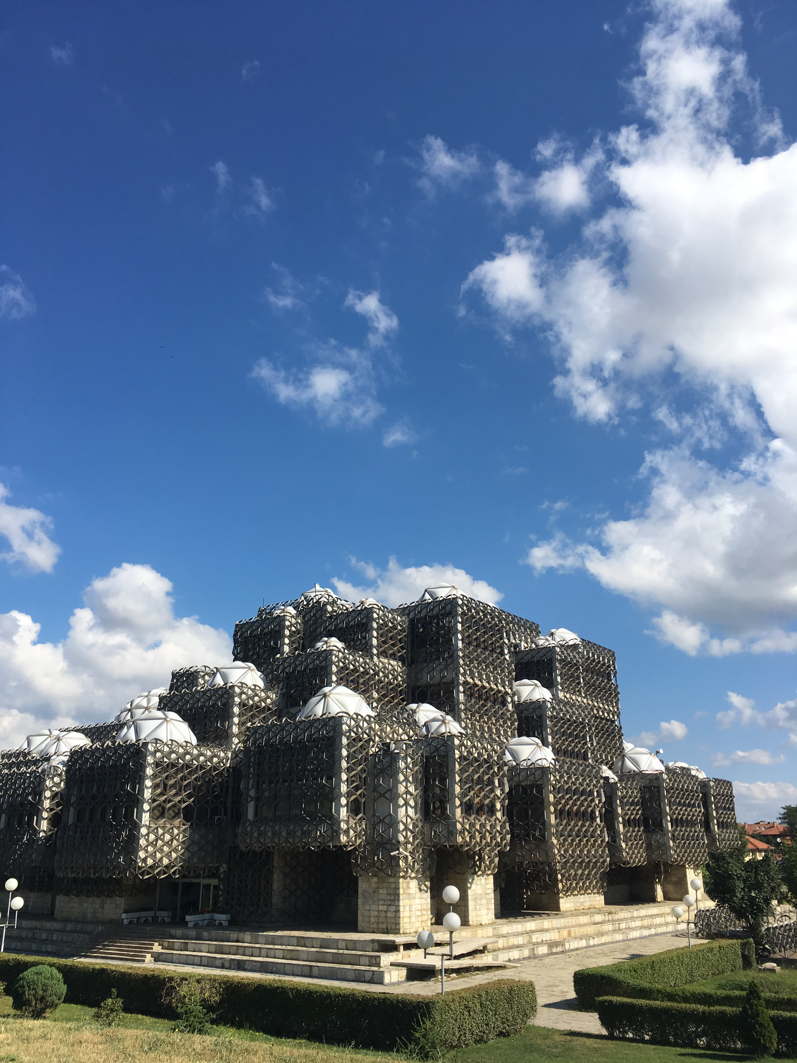 Национална библиотека на Косово